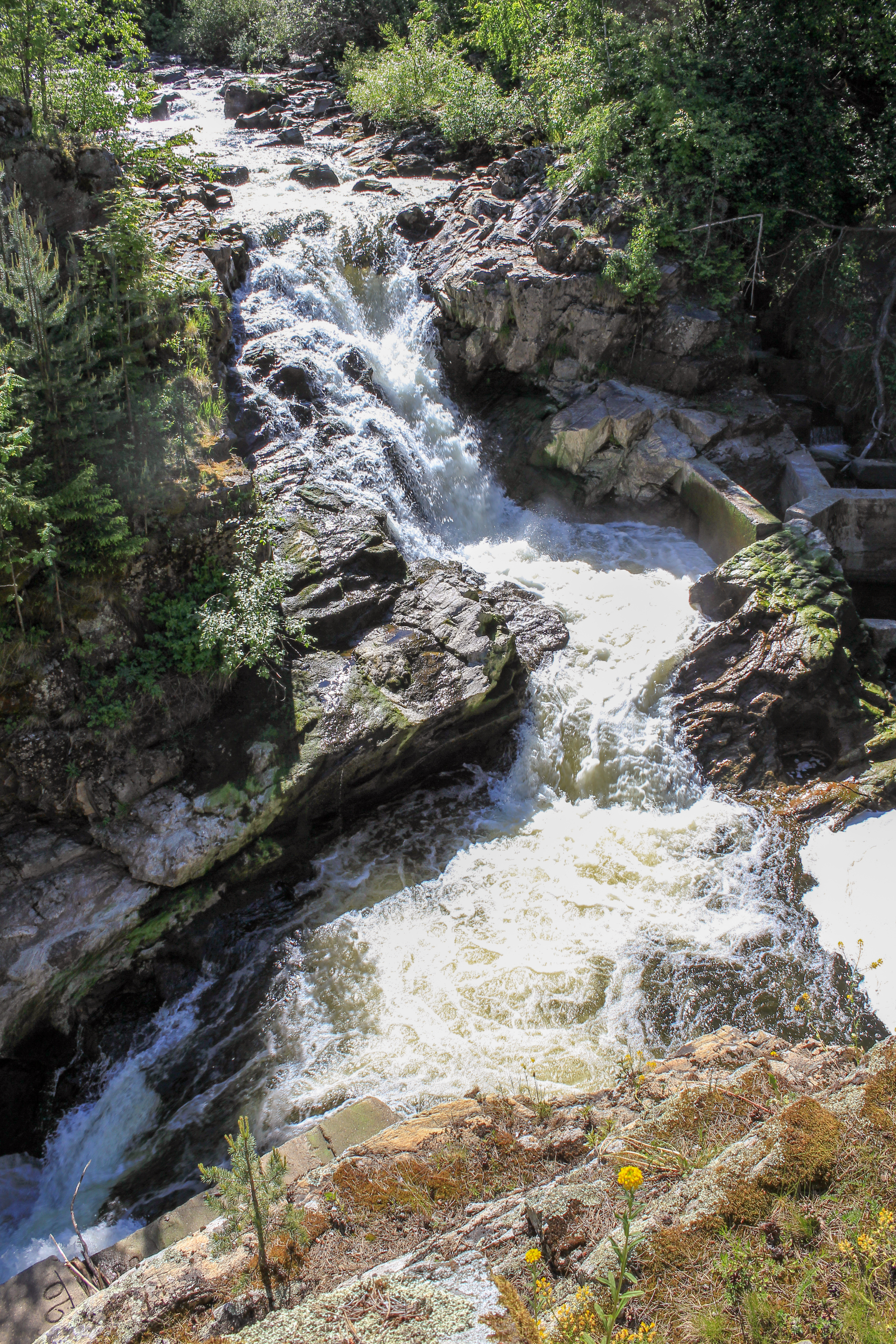 Kvernumsstrykene i Lenaelva på Skreia. For bruk av bildet se min profil.